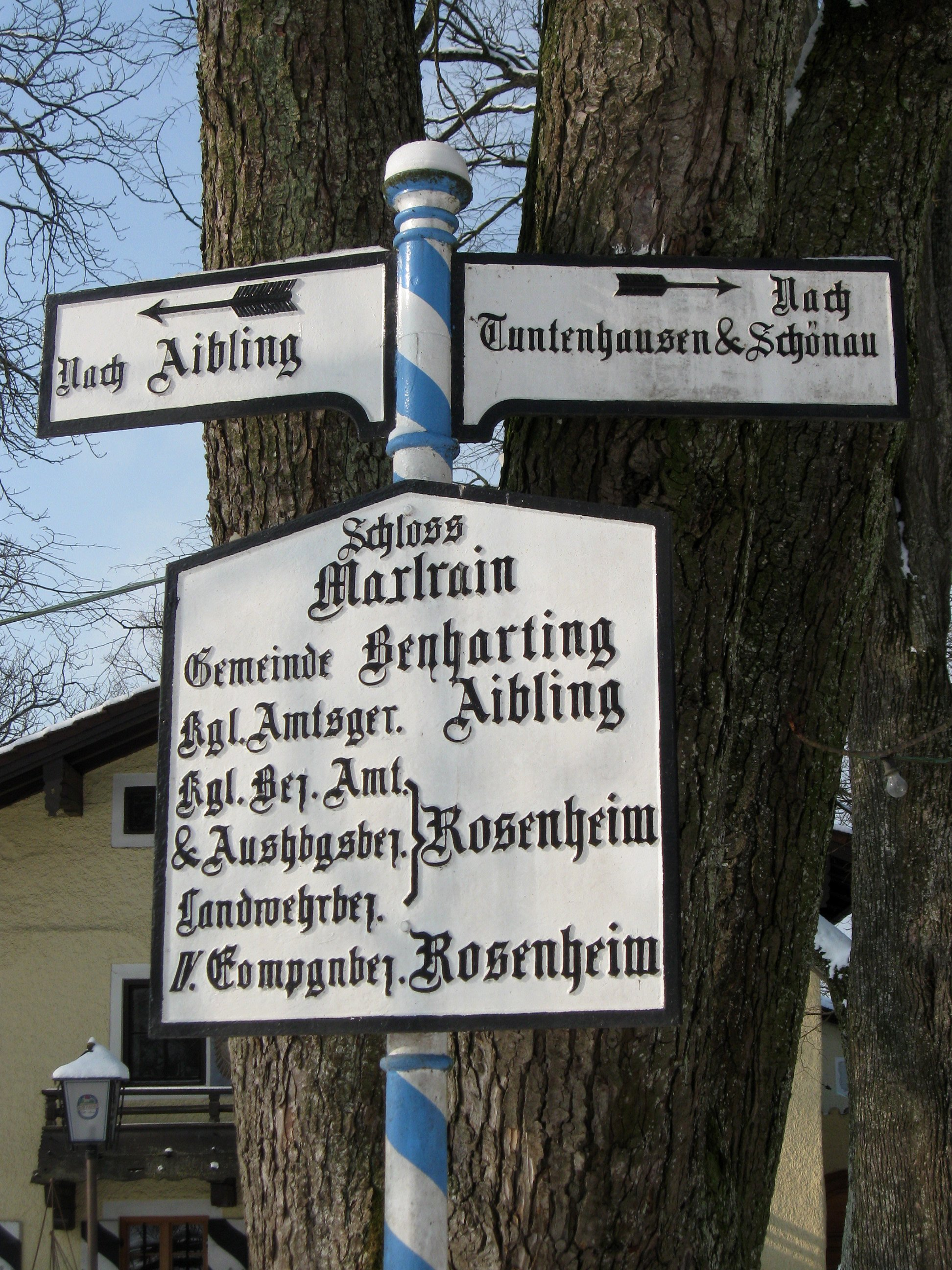 Freiung 1, Maxlrain; Historischer Wegweiser vor der Schlosswirtschaft